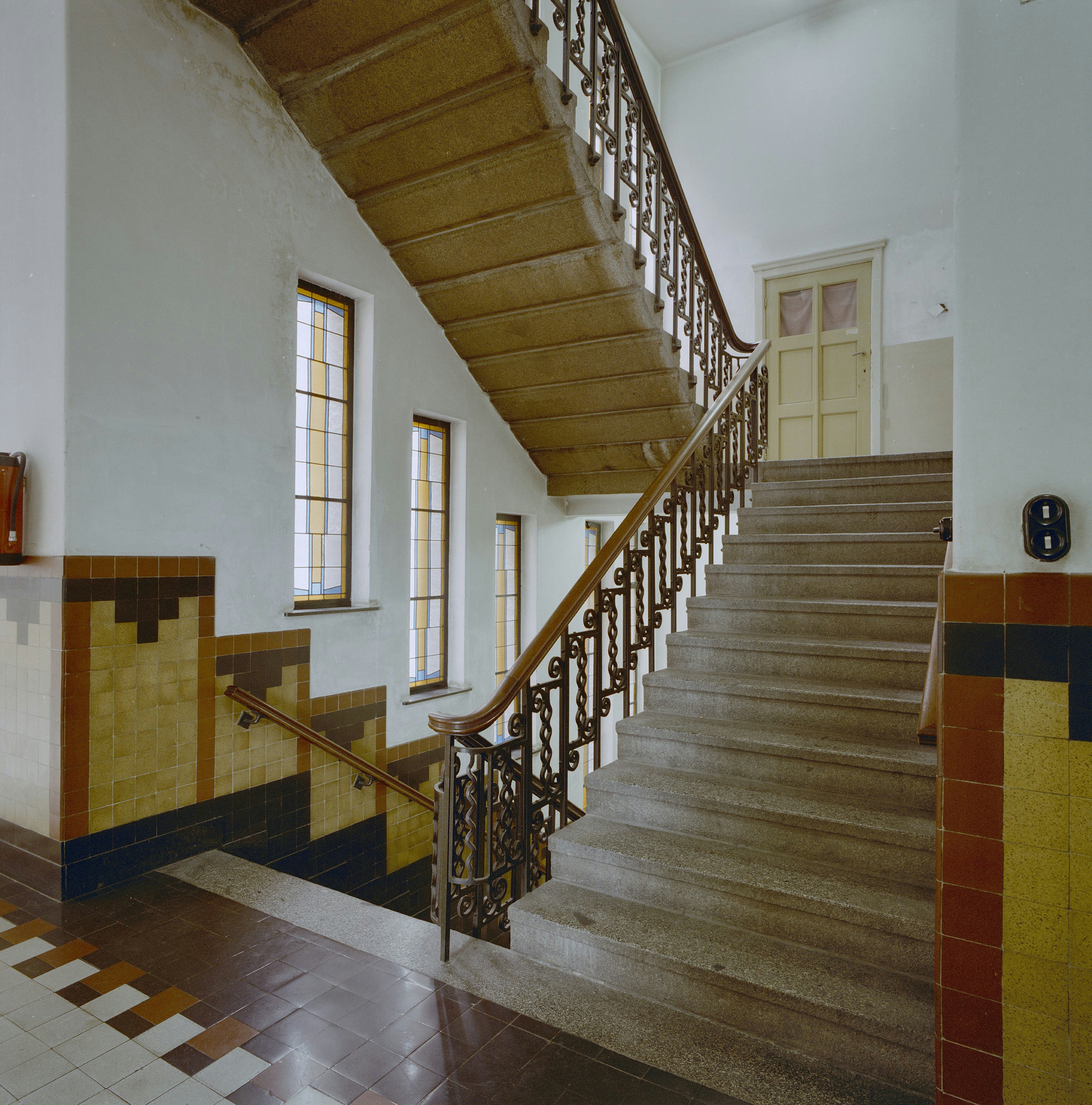 Trap: Interieur, overzicht trappenhuis